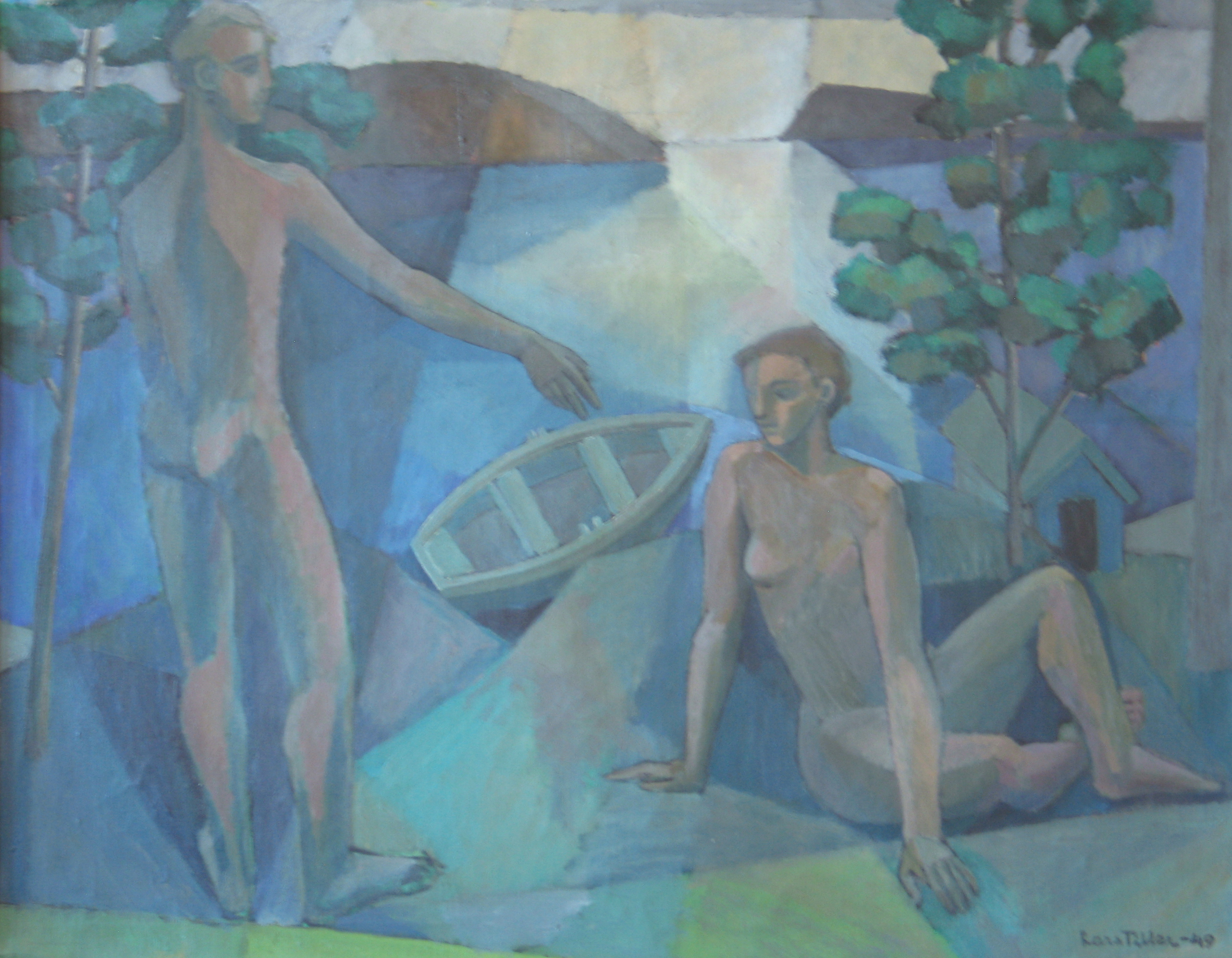 Maleriet "Invitasjon til reise" er inspirert av C. Baudelaires dikt "Invitation au voyage". Olje på lerret, 70x90 cm. 1949